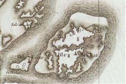 Montmorency (France) - carte de Cassini vers 1780